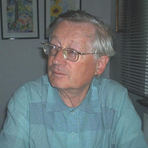 Karl Heinz Türk, Historiker, Buchautor und Heimatforscher aus Nörvenich